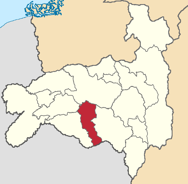 Mapa localizador del cantón en Loja, Ecuador